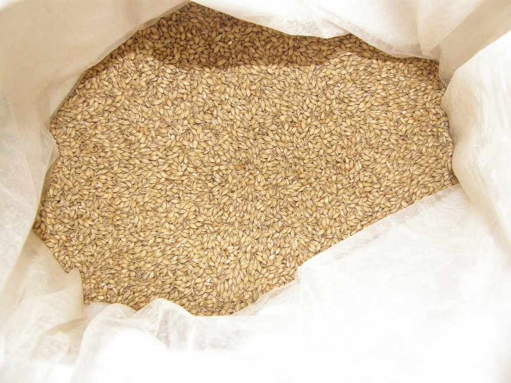 Malzsorte hell (?) zum Auswiegen der Schüttung, verwendet für das HannoverWikiRed Bier der HBX Stadtbrauerei, Hannover.